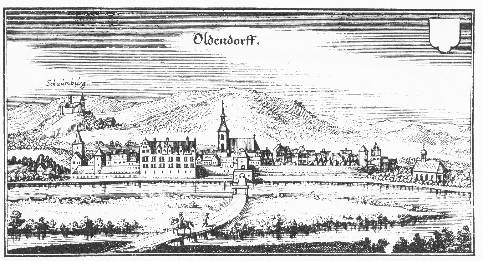 Merian-Stich aus dem Jahr 1647, zeigt das frühe Hessisch Oldendorf. Quelle: gescannt aus "Hessisch Oldendorf 750 Jahre" v. 1983. Auch als Motiv auf Wandtellern etc. zu finden.